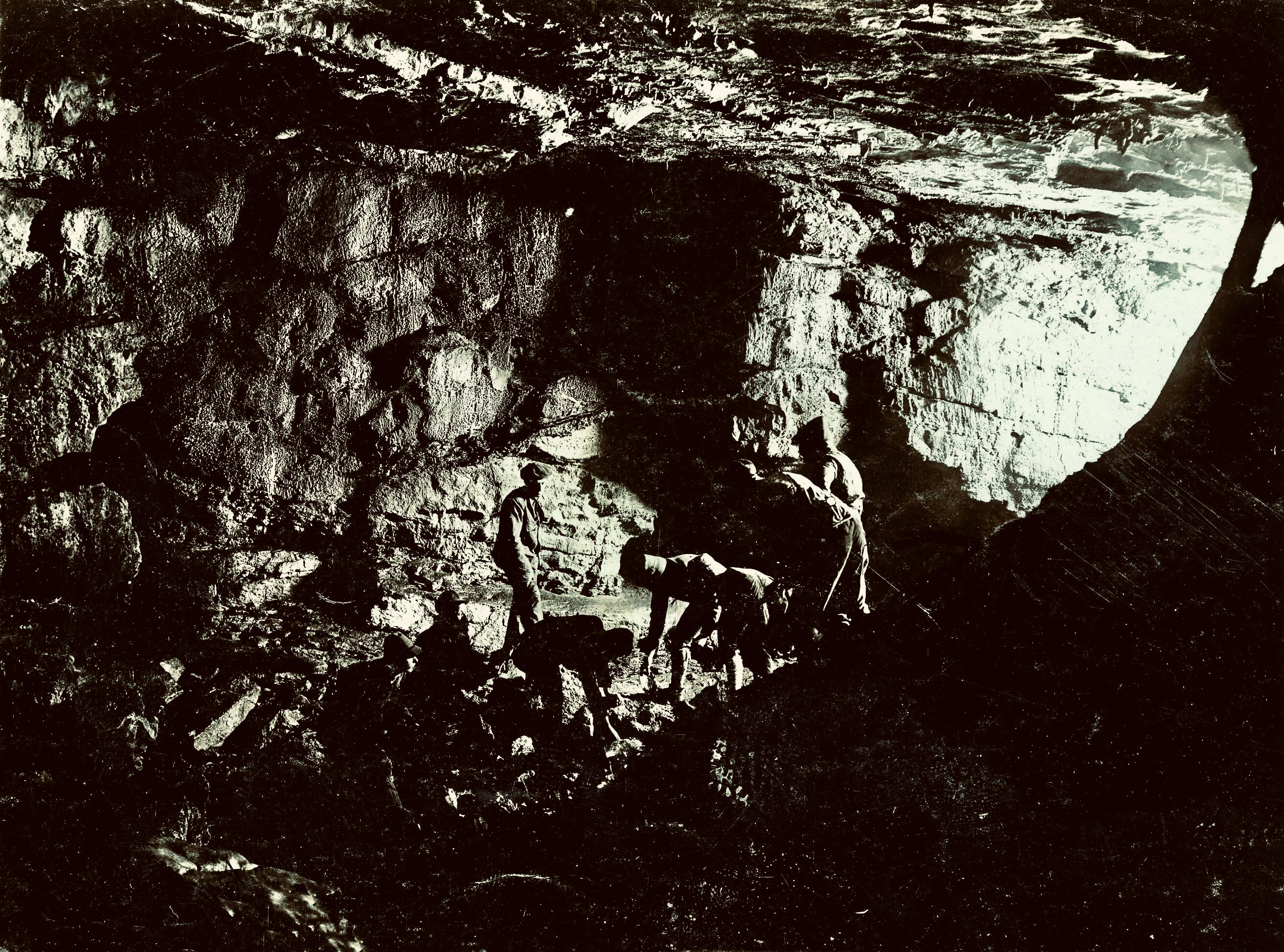 Drenovci - v jami.